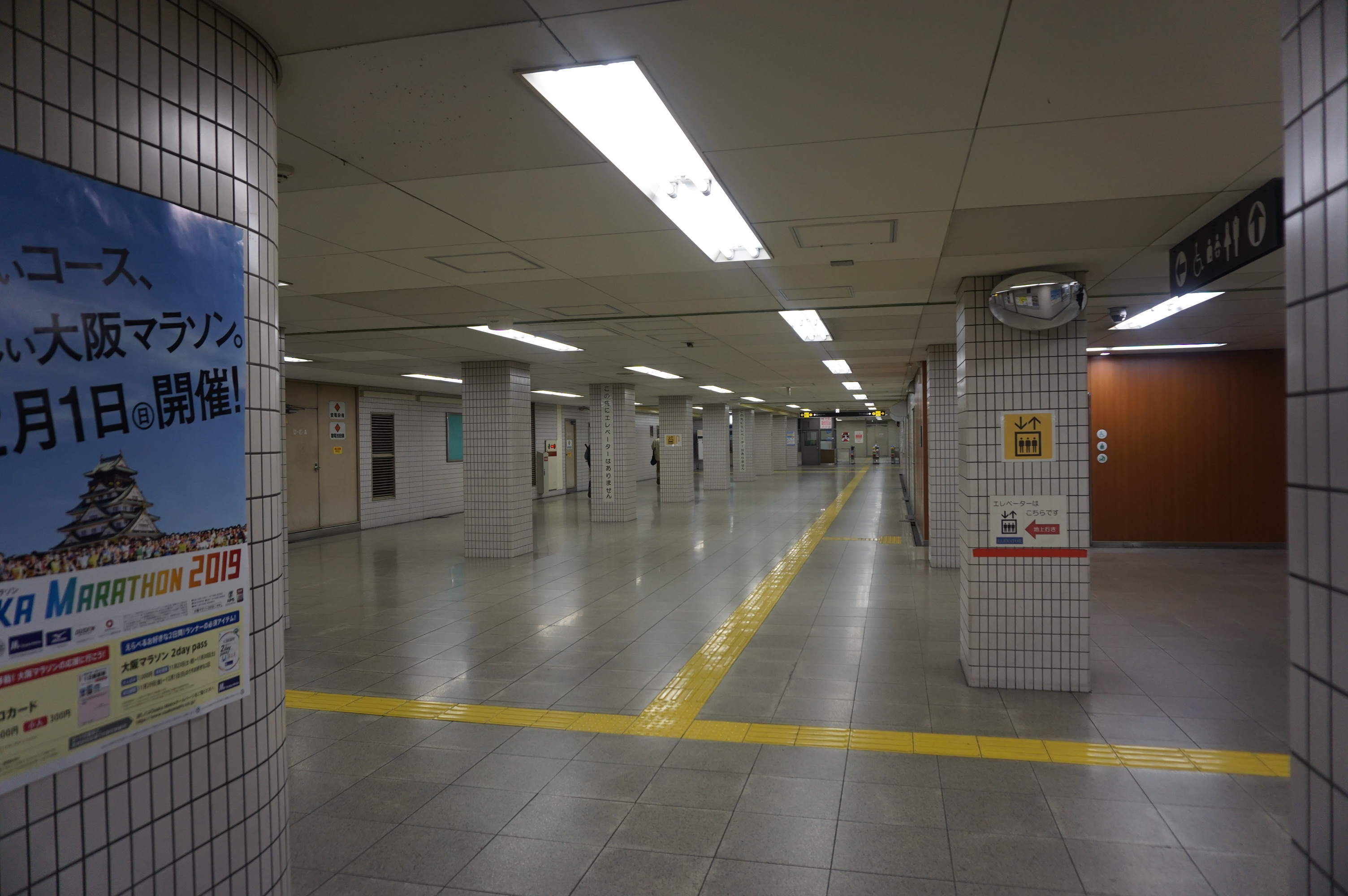 2019-12-1撮影